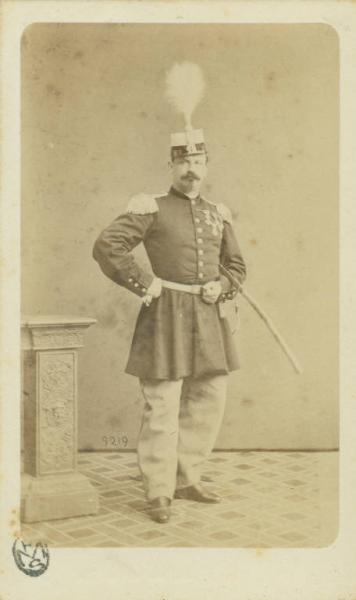 Fotografia del generale Giuseppe Dezza, in uniforme del Regio Esercito